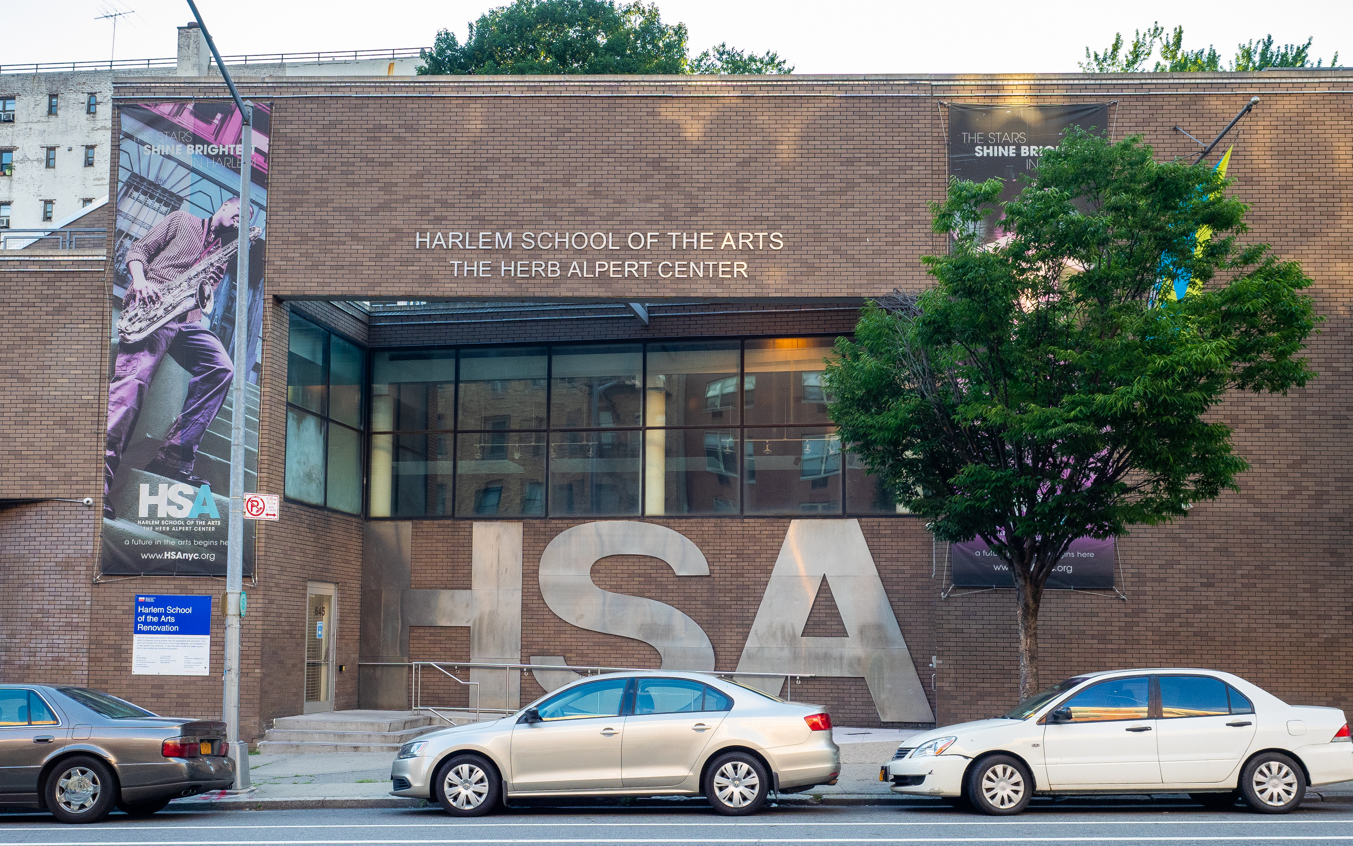 Harlem, Manhattan, NYC